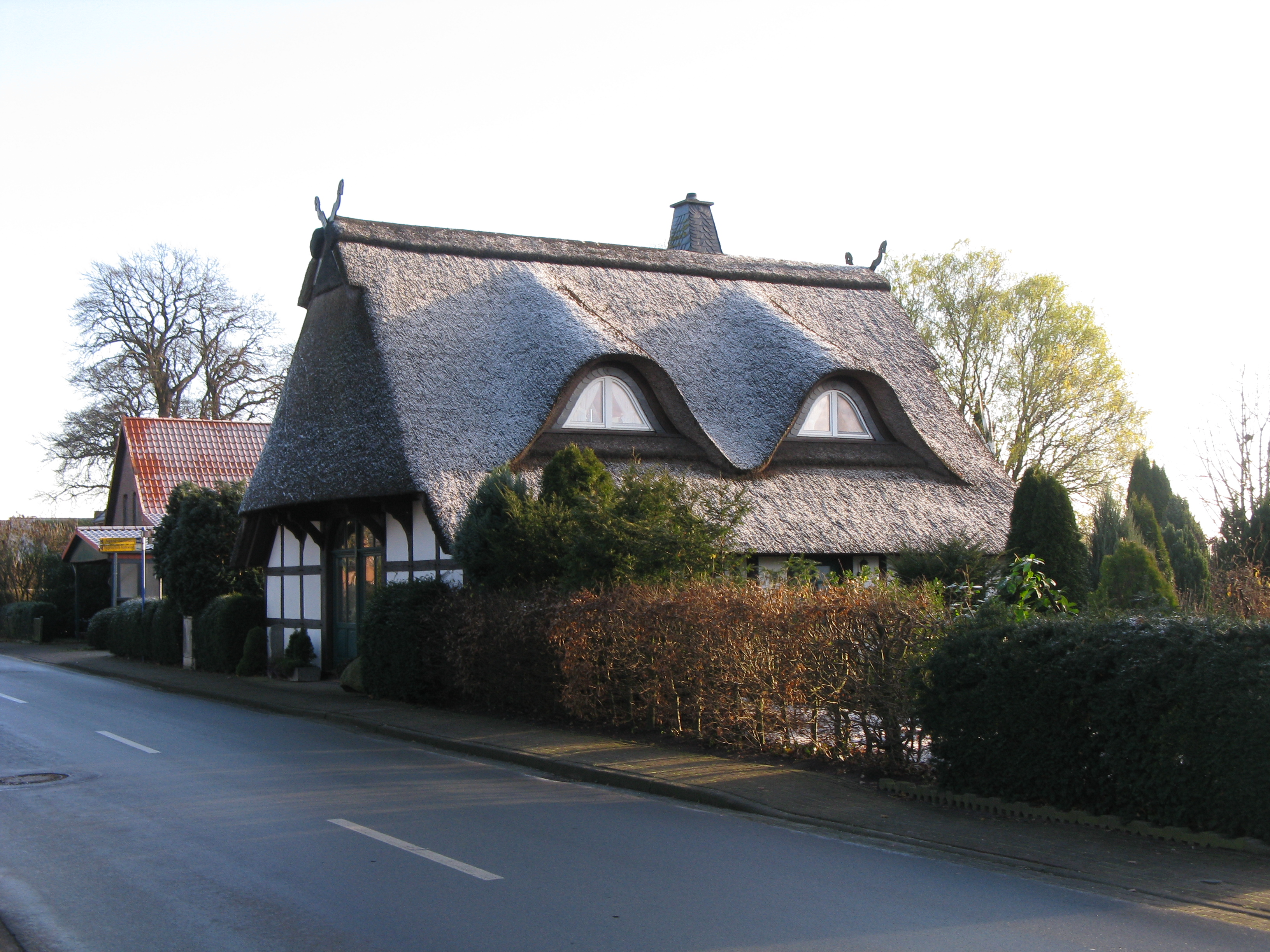 Budynek w Lembruch